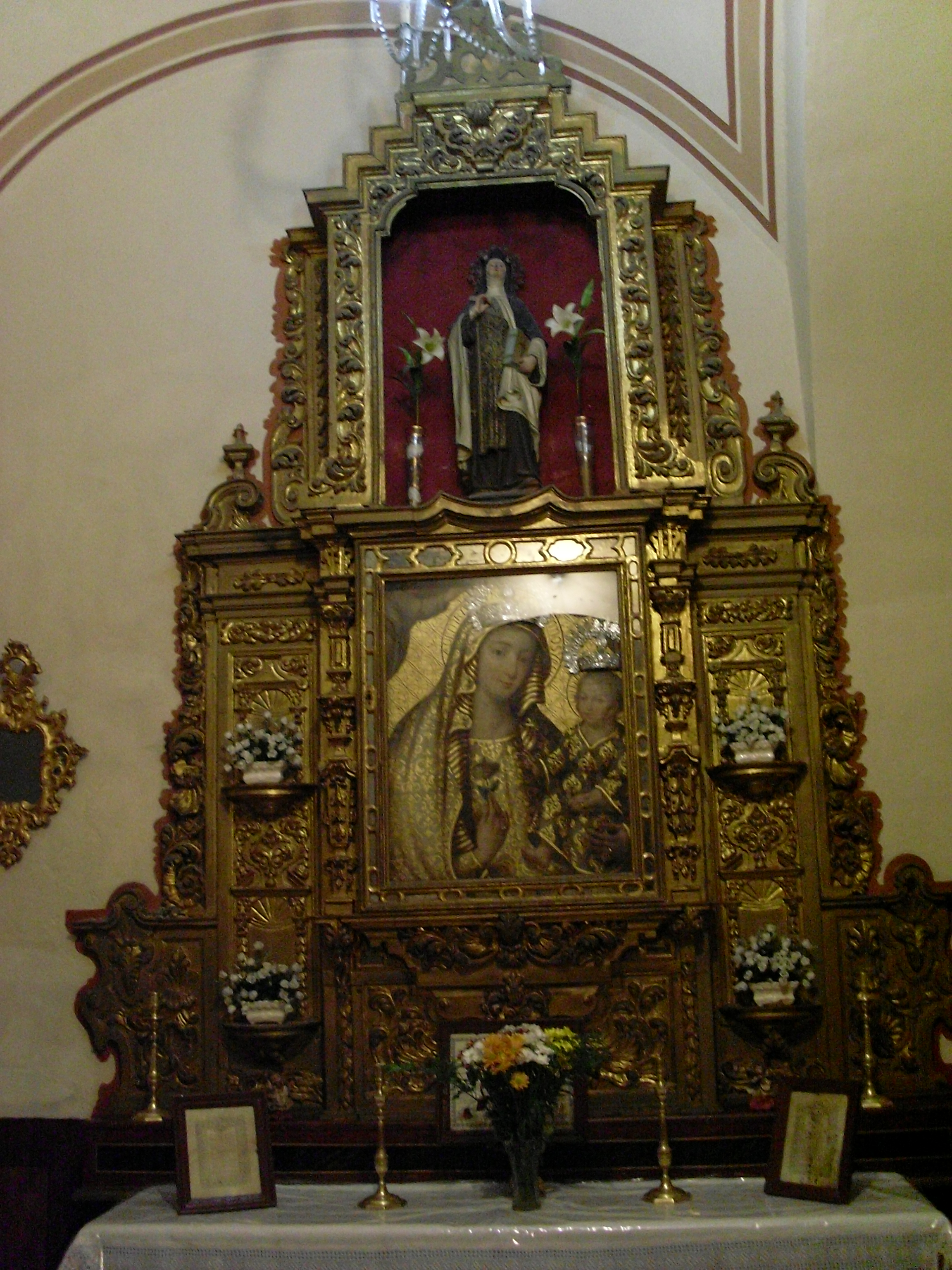 Retablo de la Virgen de la Antigua de la Iglesia de Santa Bárbara de Écija.